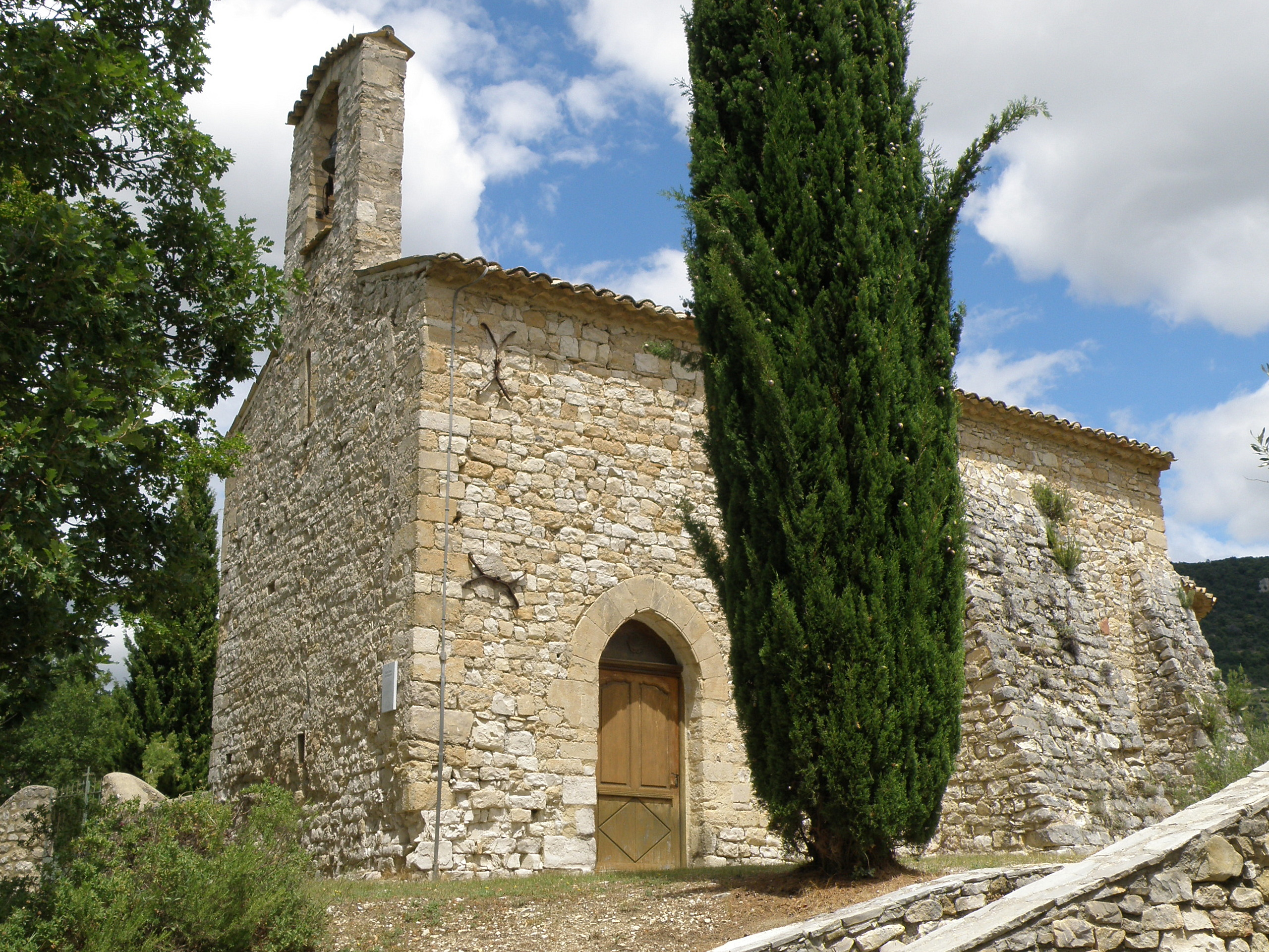 La Penne-sur-l'Ouvèze (Drôme, France). Chapelle Notre-Dame-des-Aspirants.